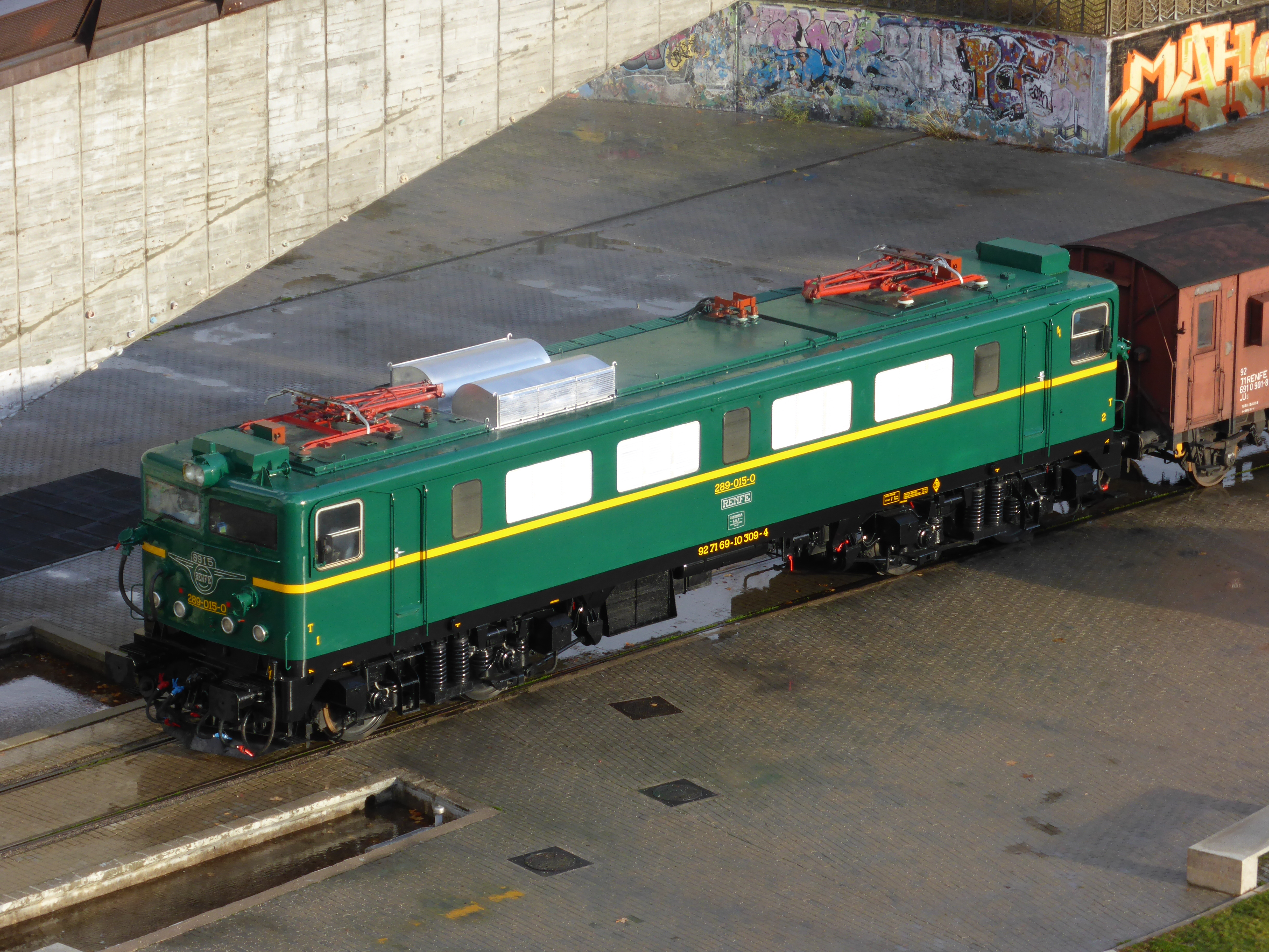 Locomotora eléctrica, matrícula: 289-015-0, de Renfe. Numeración antigua: Renfe 8915. Fotografía tomada en la vía exterior de la estación Madrid-Delicias, en un pequeño tramo sin catenaria, siendo remolcada por una locomotora diésel del Museo del Ferrocarril de Madrid, durante la realización del Tren de Navidad 2013-2014.